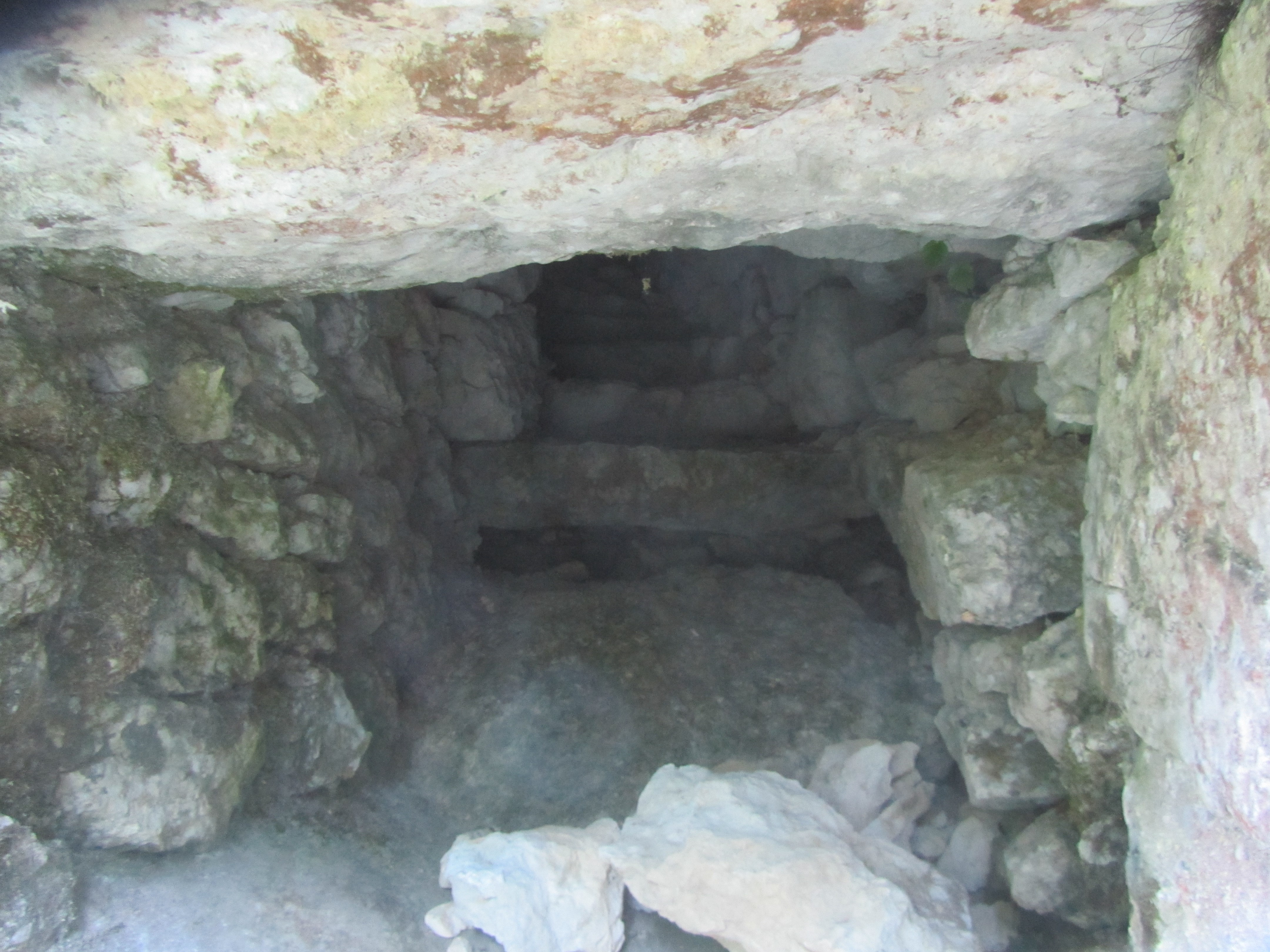 Cet escalier sur la voie romaine aux Echelles (73) a été conservé sous la rampe aménagée par Charles-Emmanuel II vers 1670